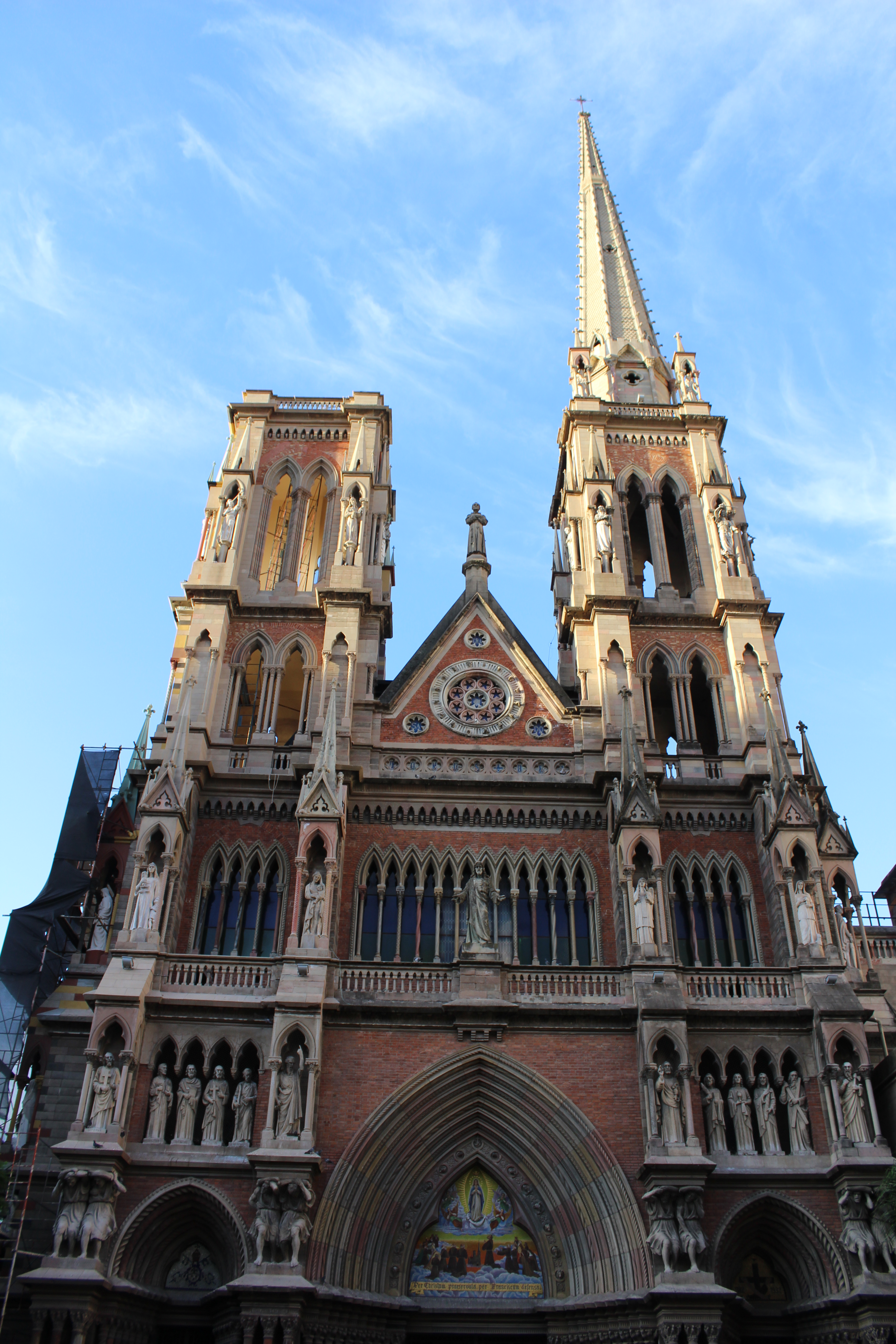 Iglesia Capuchinos - Frente parcial